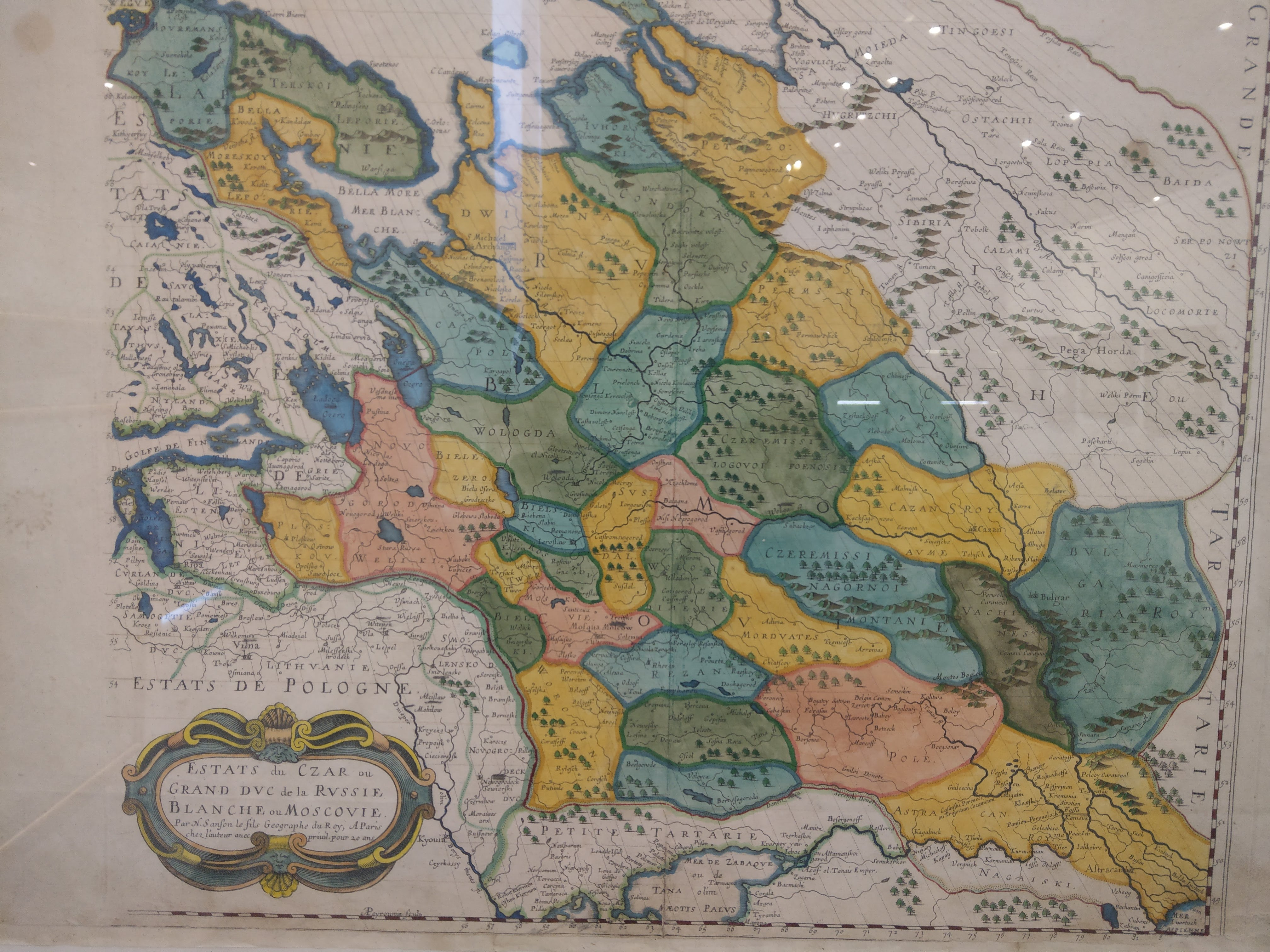 Карта "Владения Царя или Великого князя Белой Русии или Московии", 1697г., Париж. Экспонирована впервые в 2019 году в Историческом музее Минска.